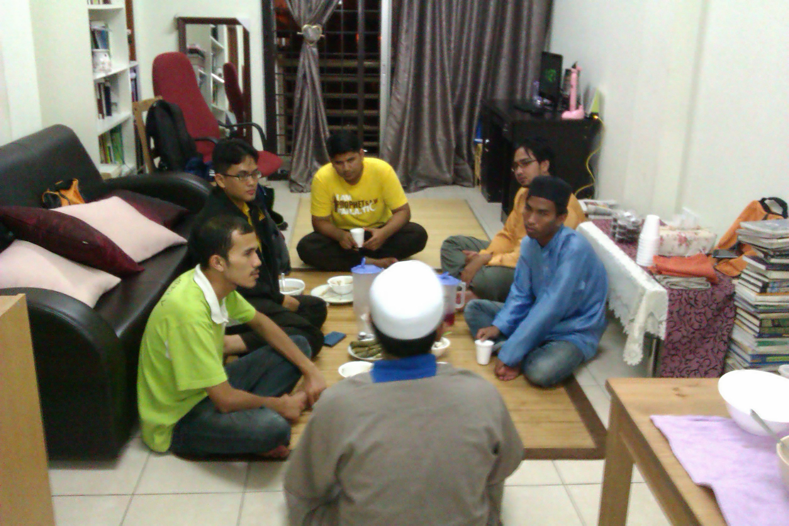 Aktiviti usrah tidak hanya terhad kepada halaqah di masjid atau surau sahaja. Usrah boleh juga diadakan di rumah.